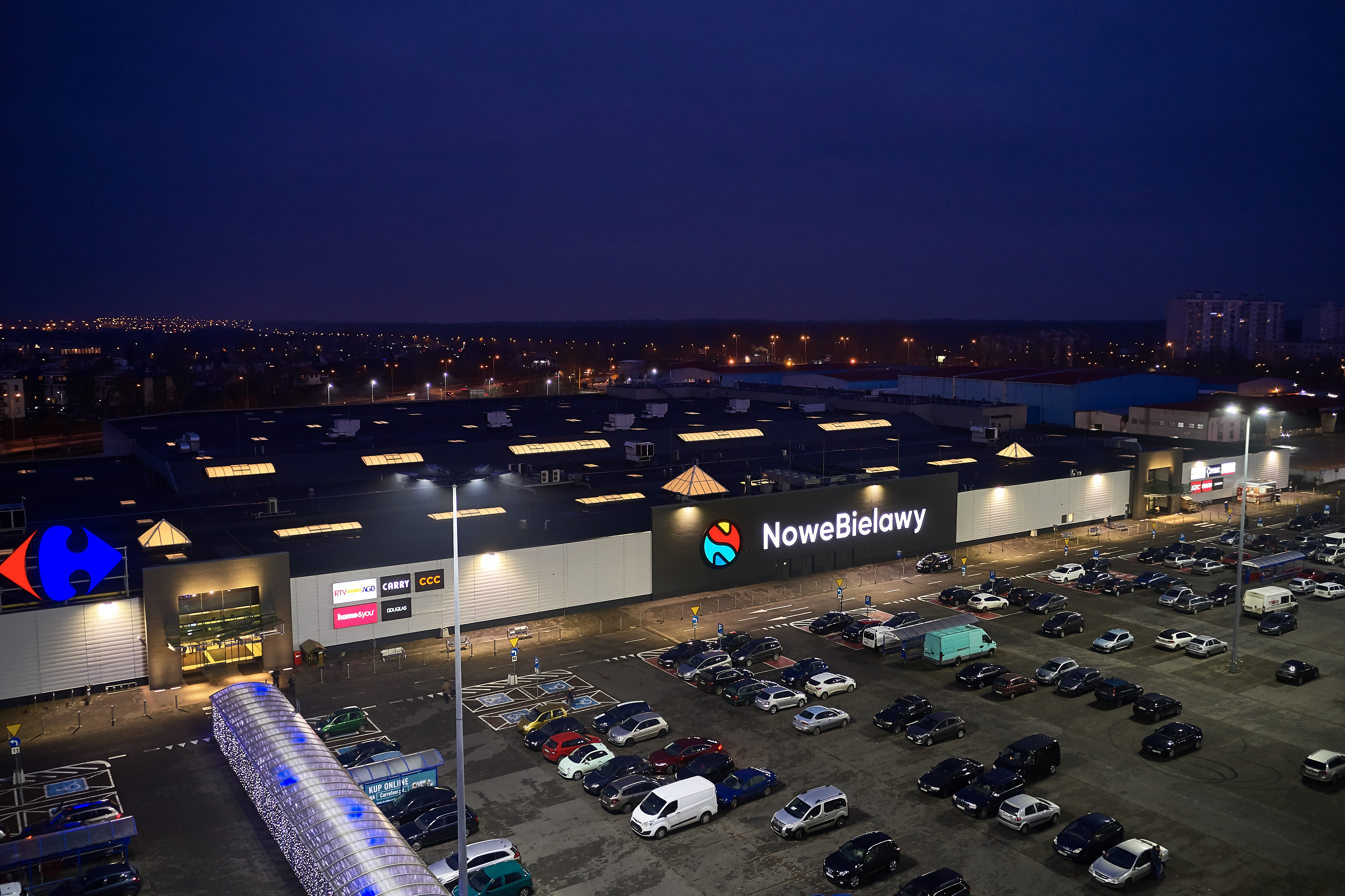 Nowe Bielawy - zdjęcie w nocy